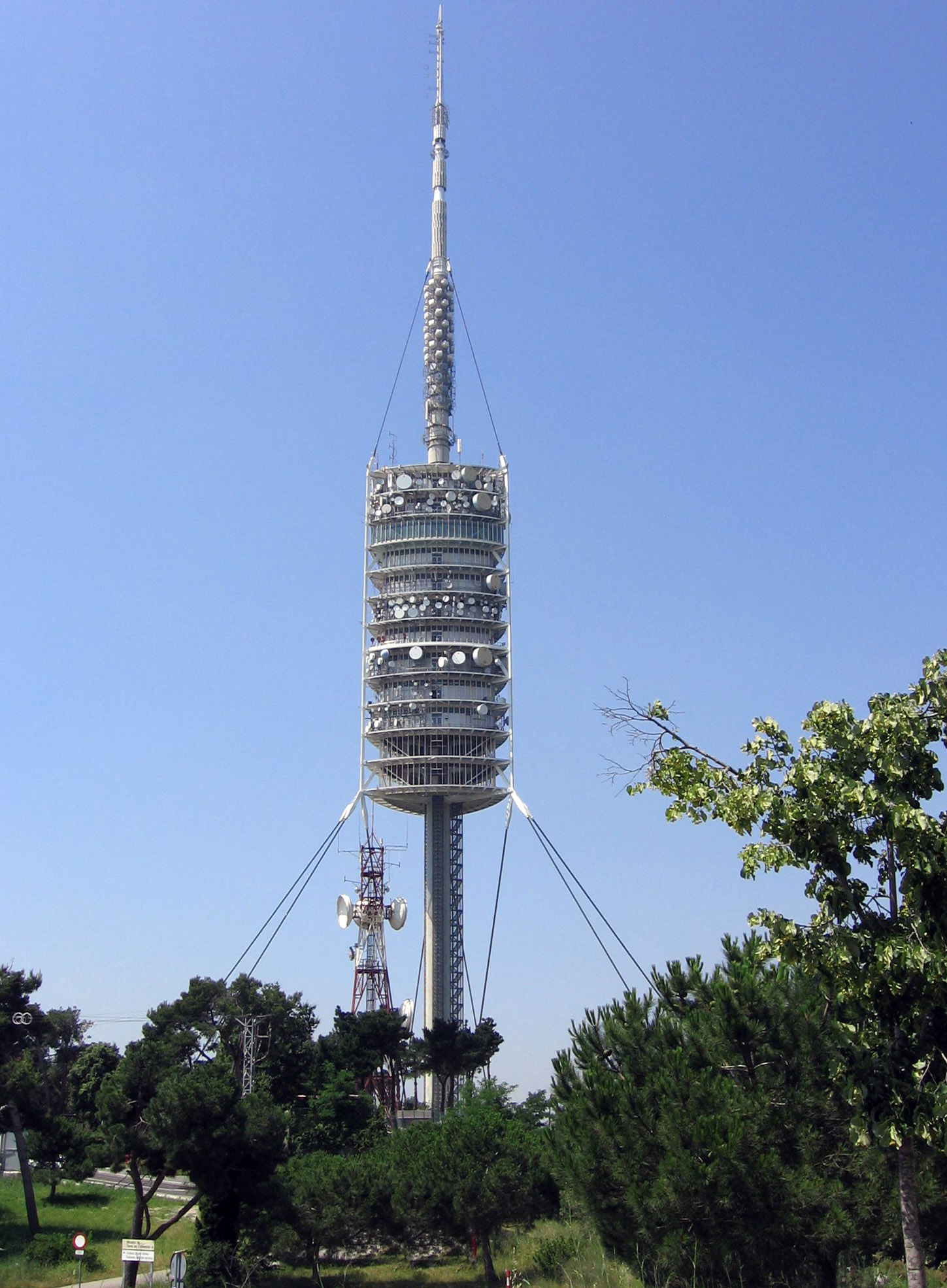 Torre de Collserola (Barcelona).